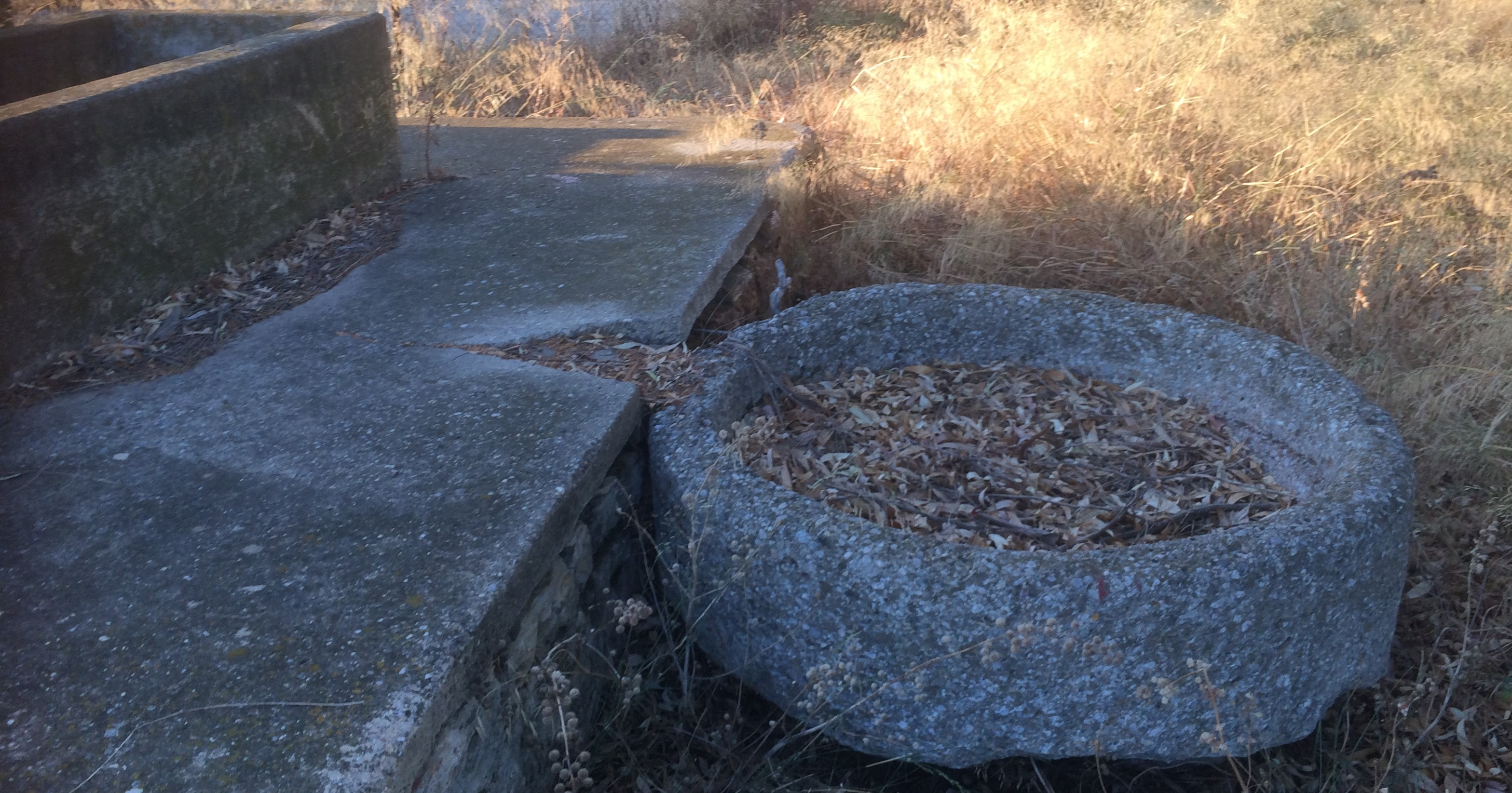 Κοινόχρηστο Πλυσταριό (όψη 3), Αστέρι Λακωνίας